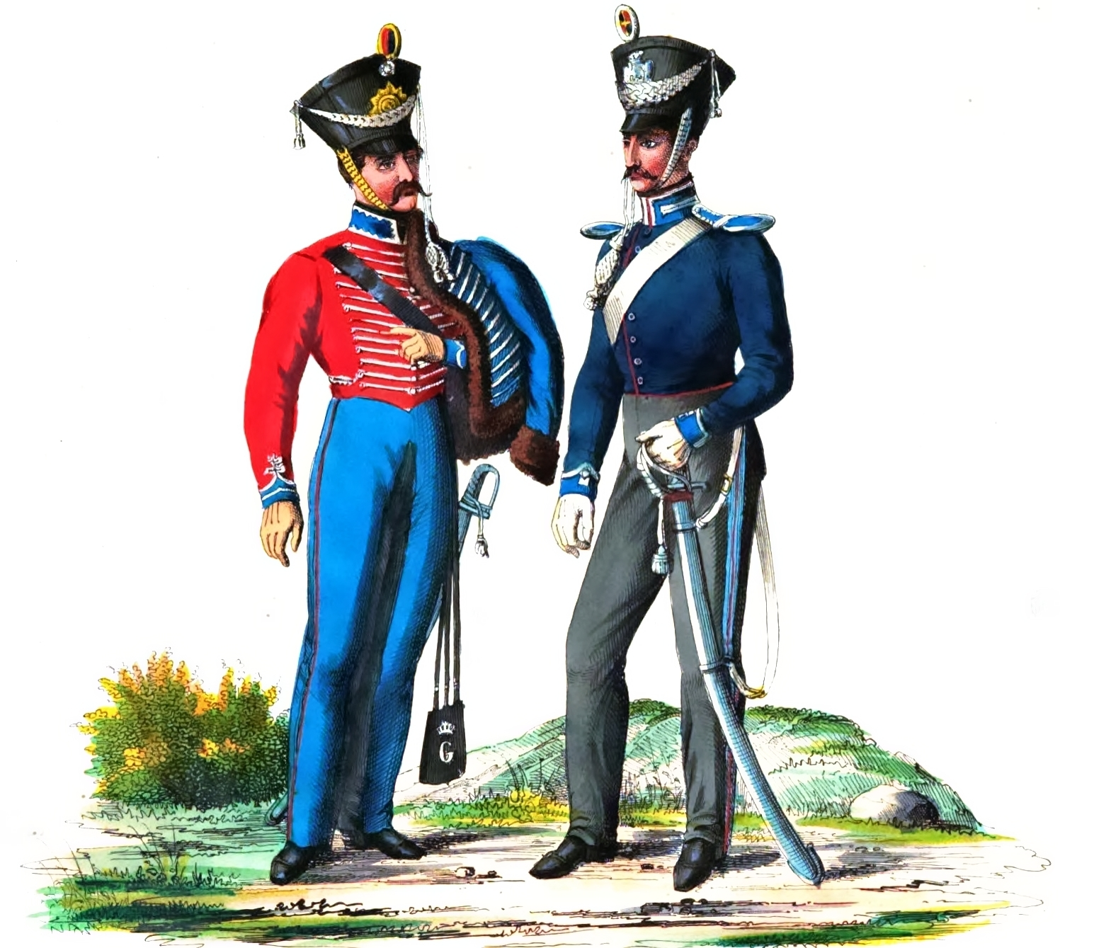 v.l. Strelitzscher Districts-Husar und Mecklenburg Schweriner Gendarms.